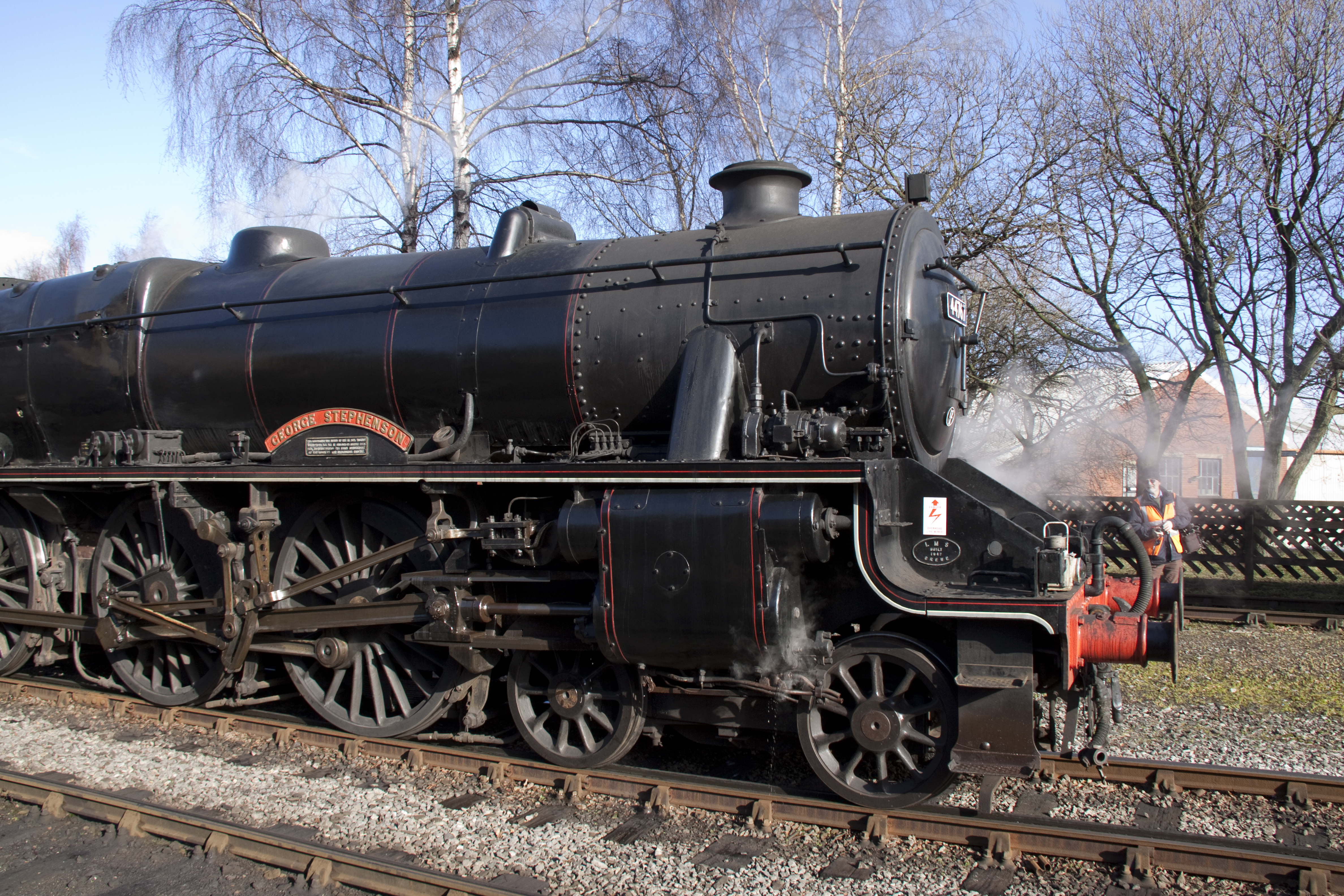 Black 5 George Stephenson 7